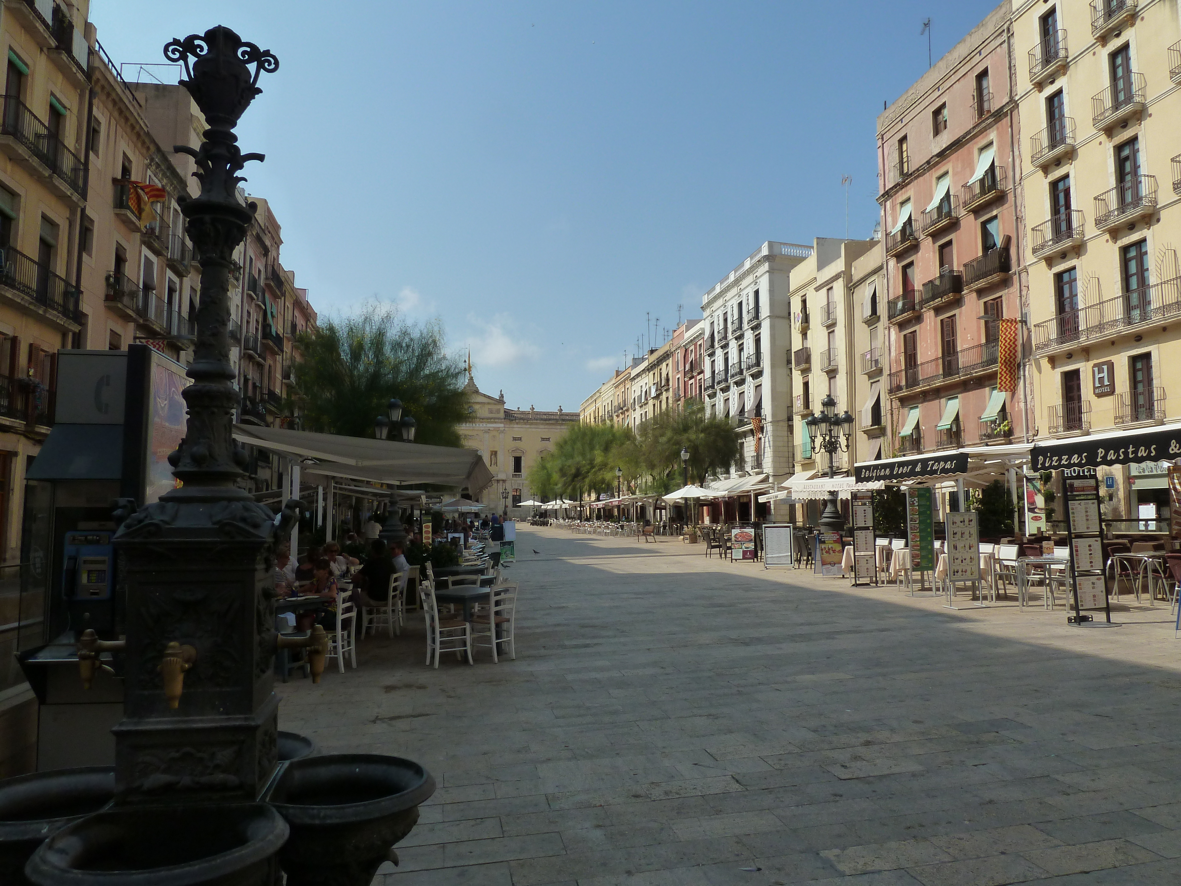 Tarragona